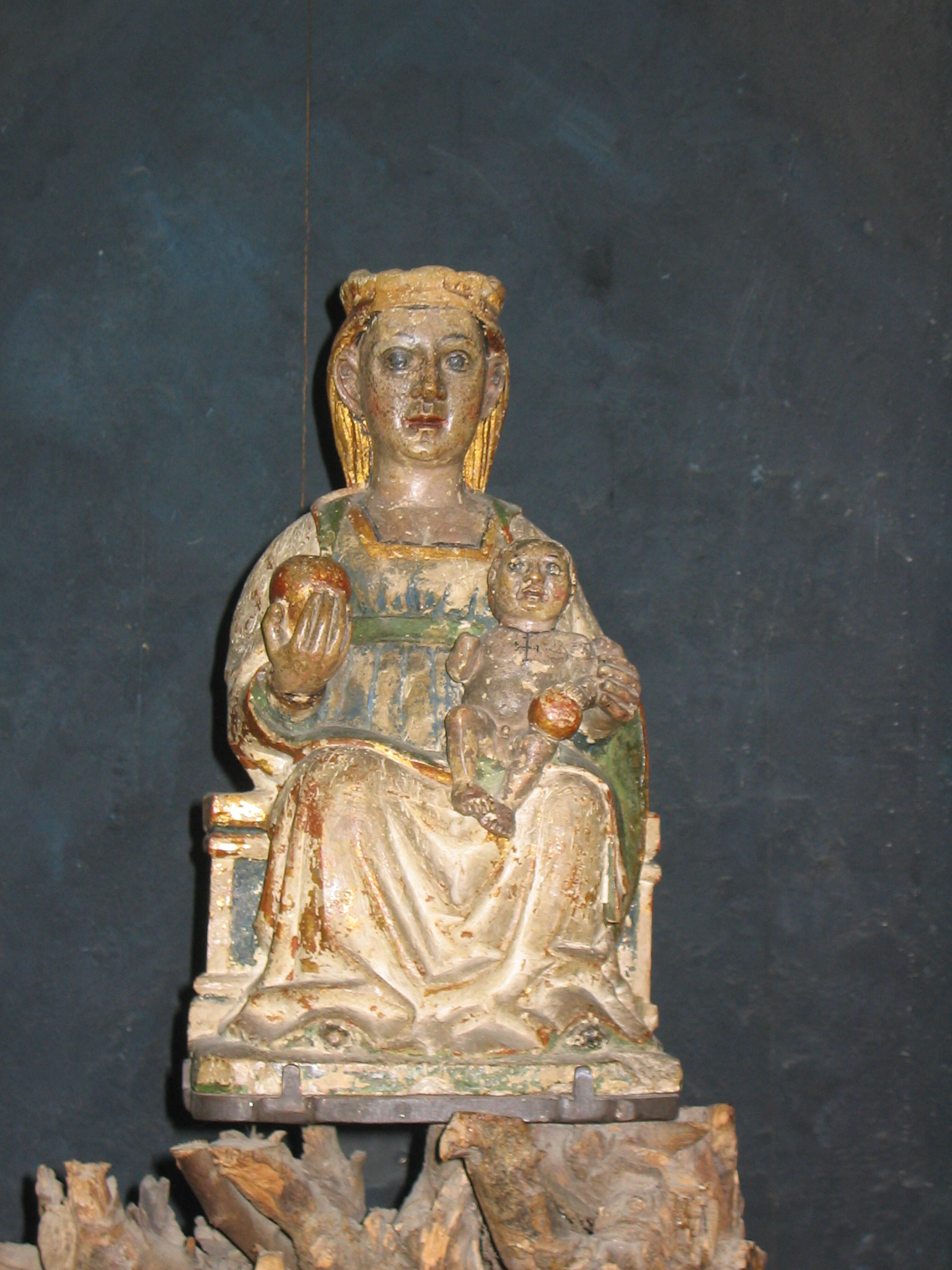 Vista Euskadi desde Urbia